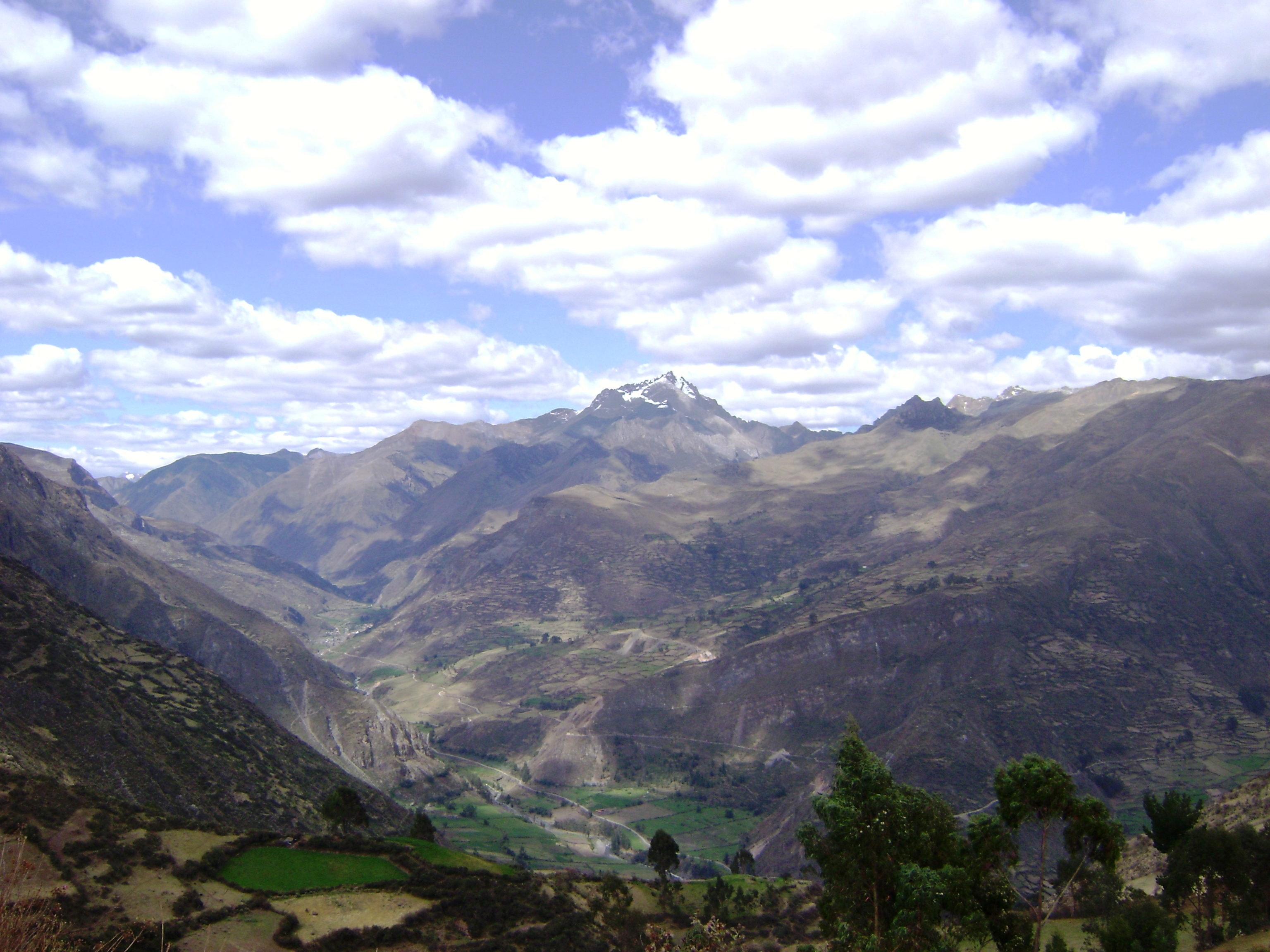 Paisaje del distrito de Chiquián en la ruta a la ciudad del mismo nombre. Provincia de Bolognesi. Ancash - Perú.